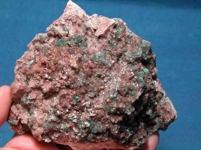 dolomit z brochantytem, pochodzenie Maroko; autor zdjecia Piotr Menducki